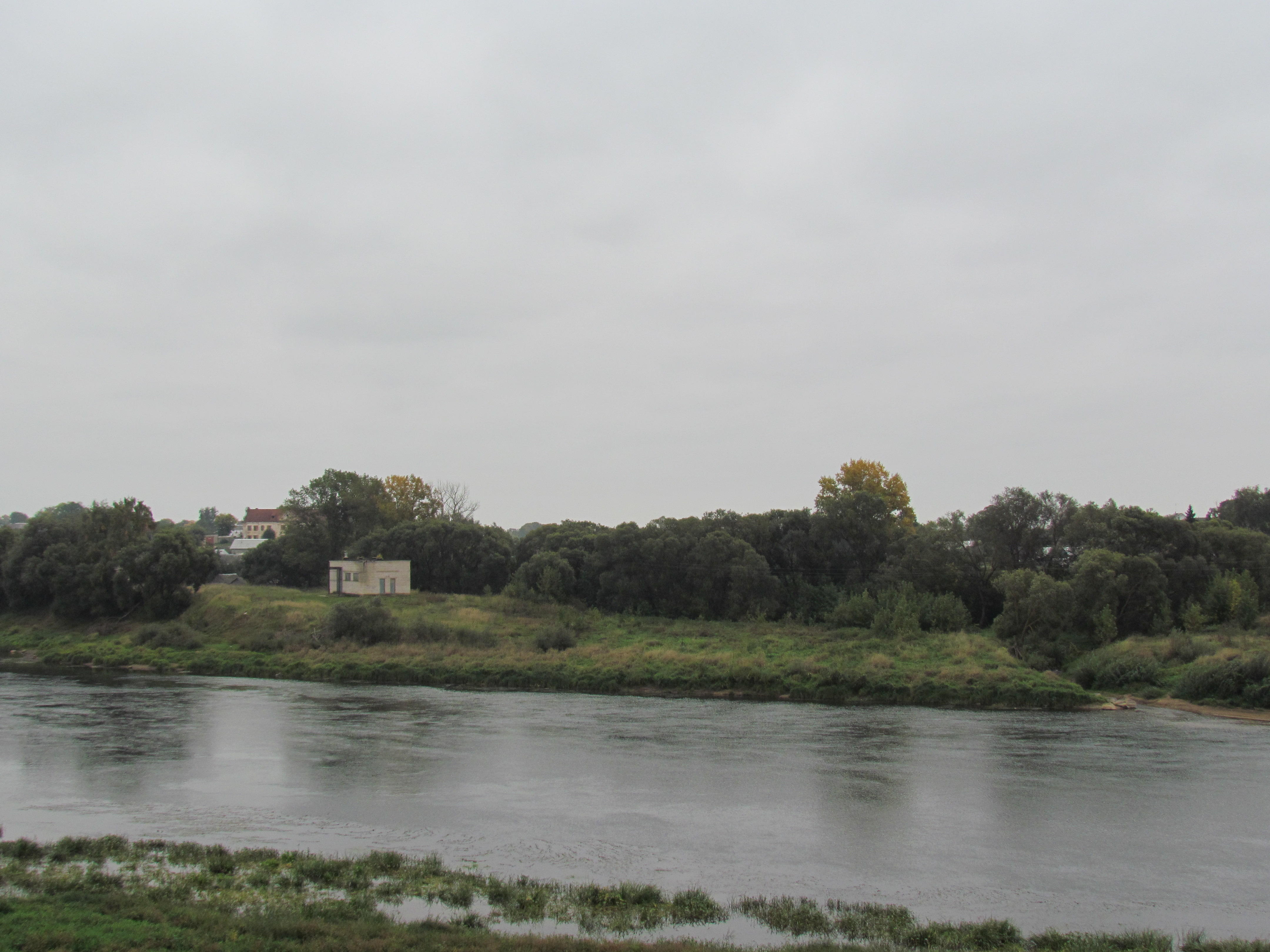 Беларуская (тарашкевіца): Dubroŭna. Zamčyšča.